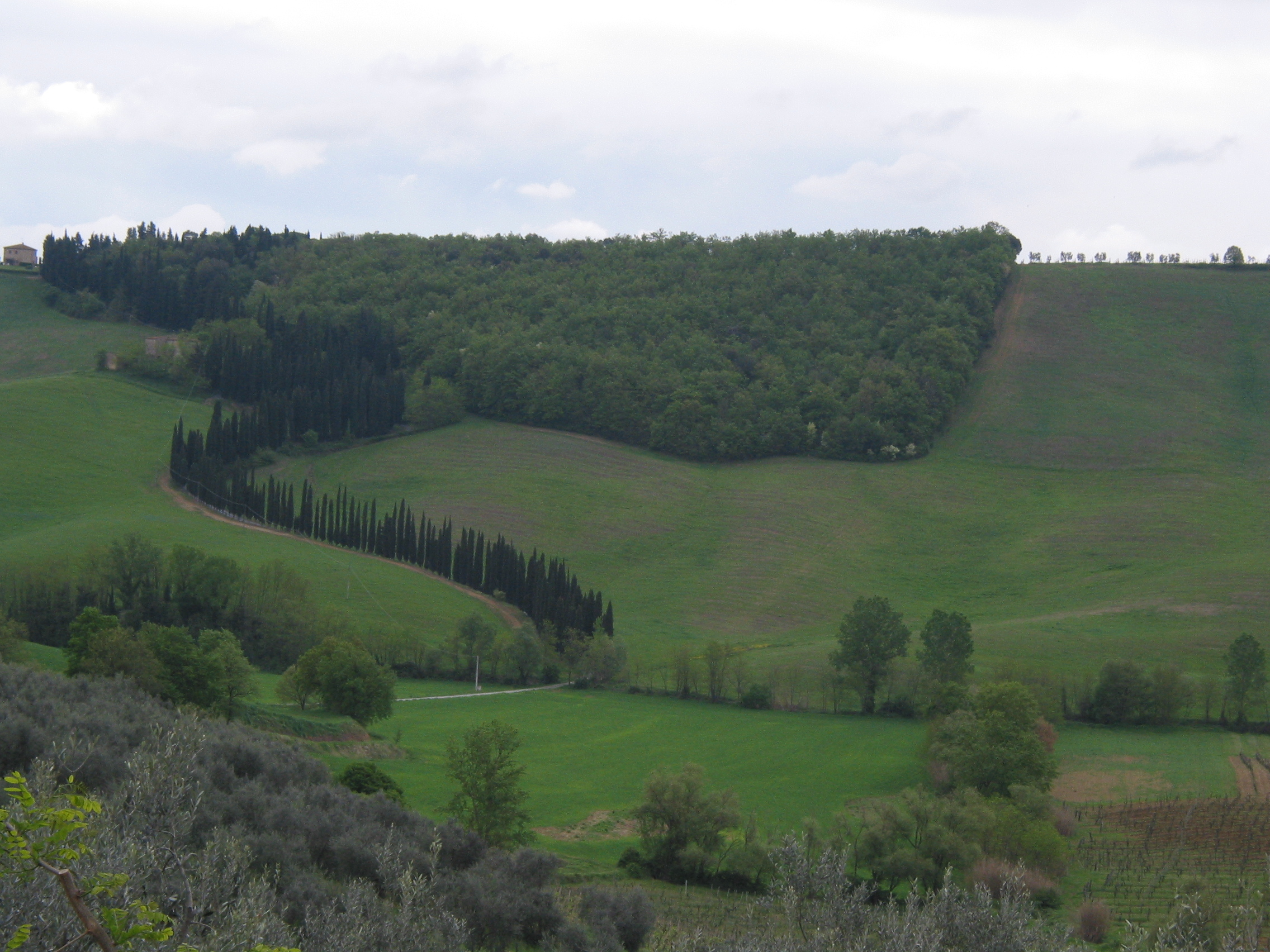 Toscane près de San Giminignano